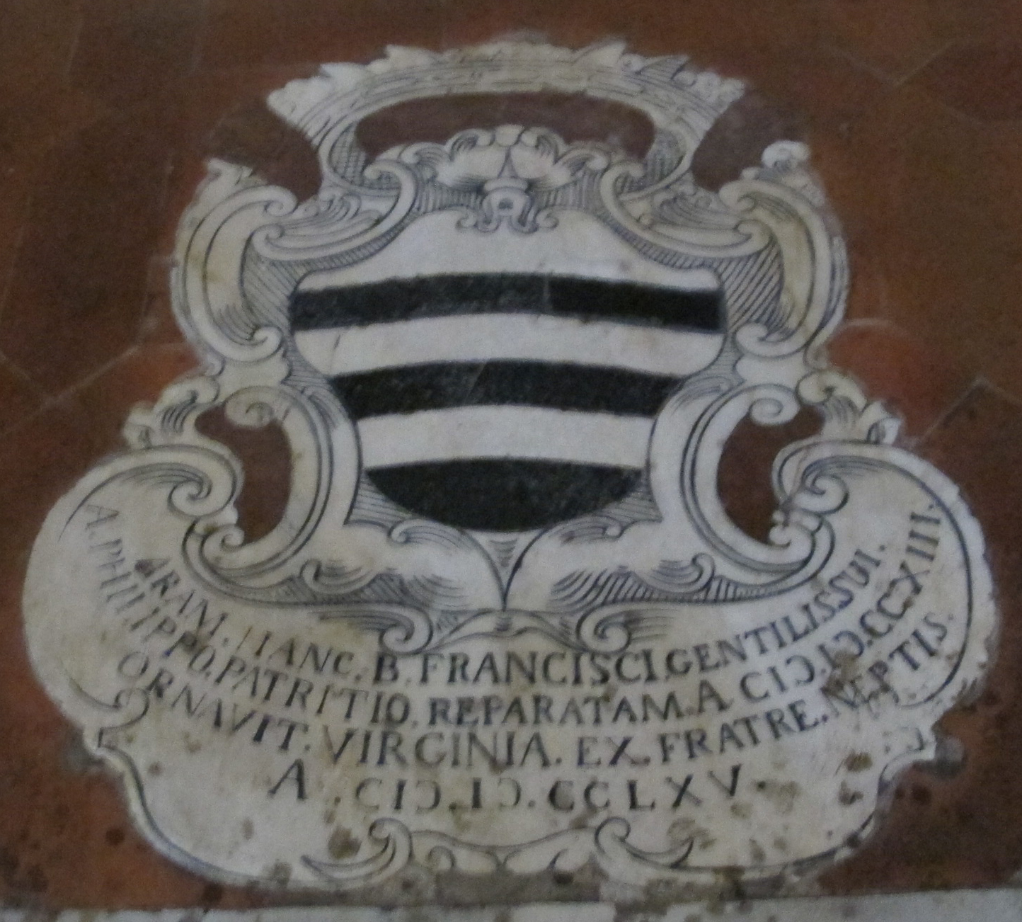 Basilica dei servi, siena 12 beato francesco patrizi